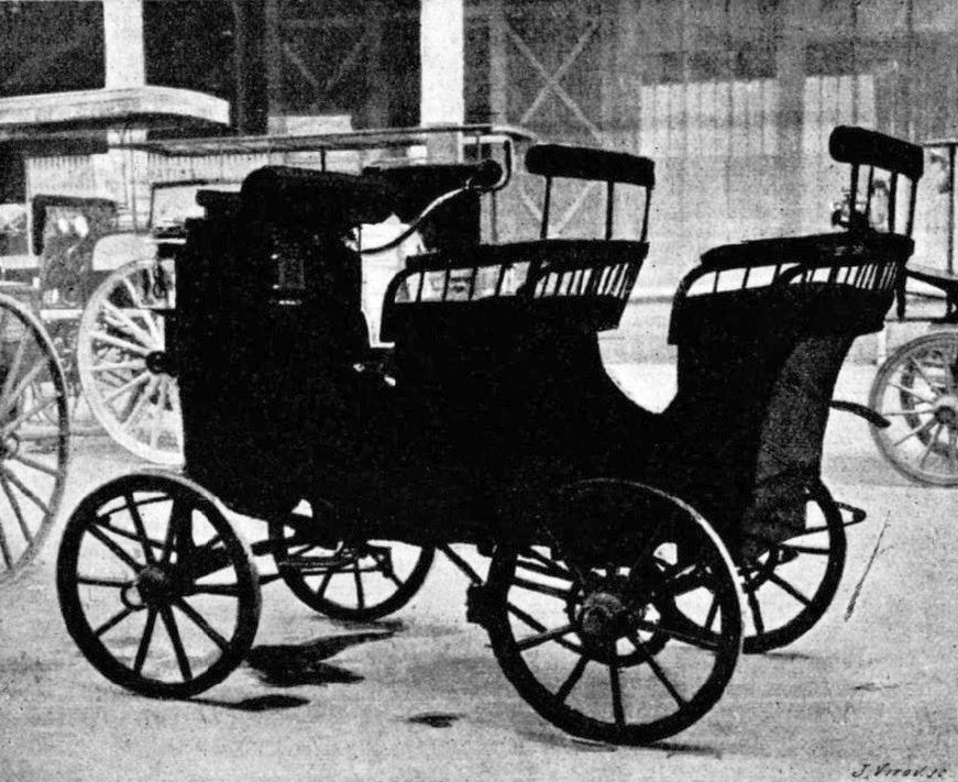 Voiture à pétrole n°18 de l'ingénieur-constructeur parisien Gautier, au départ de Paris-Bordeaux-Paris 1895 - La Science Française, juin 1895, p.330